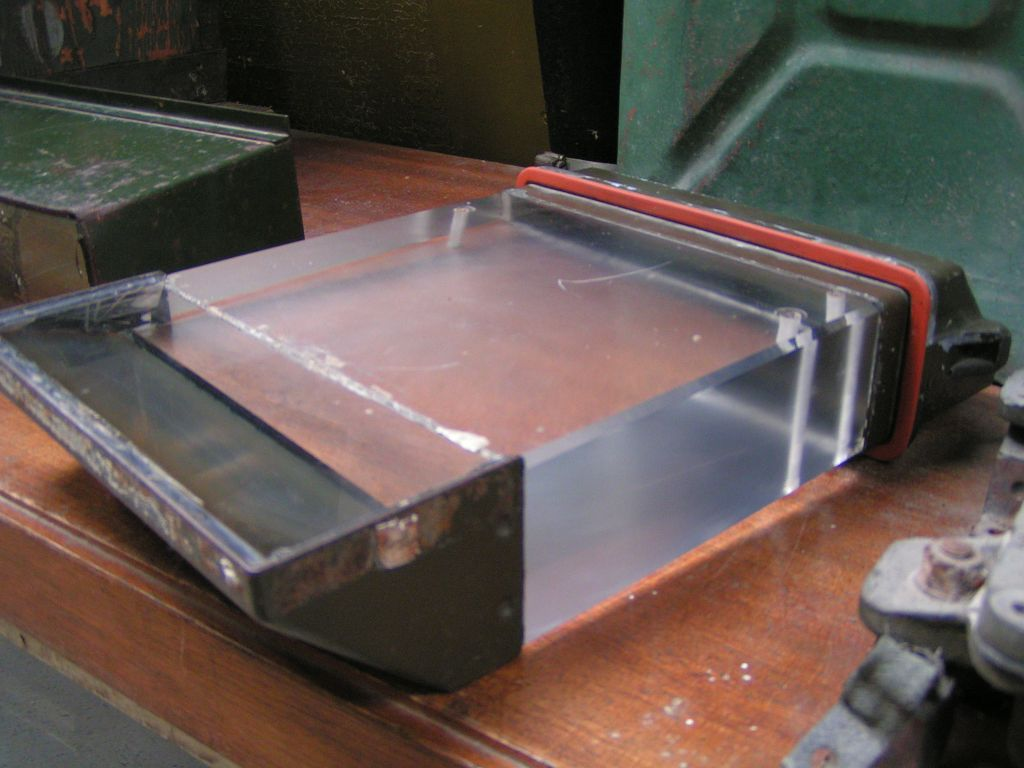 Ausgebautes_Spiegelperiskop_eines_Panzers